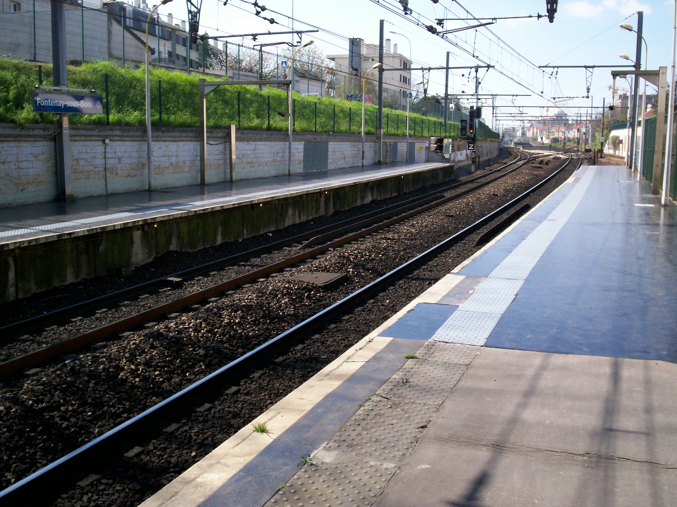 Gare de Fontenay-sous-Bois avant la création de l'accès ouest pour les personnes à mobilité réduite.